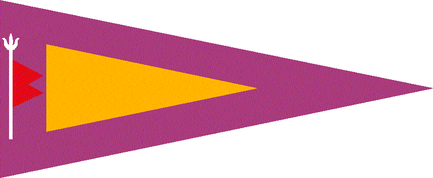 Flagge von Porbandar